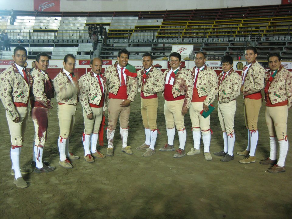 Forcados Amadores de Puebla en la plaza de toros "El Relicario", Puebla, despues de la corrida del 17 de diciembre de 2011